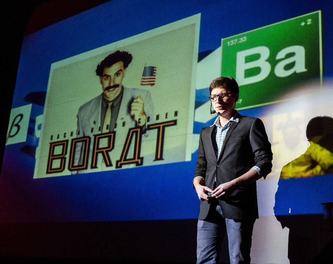 Максим Щербаков, Москва, 2 марта 2014